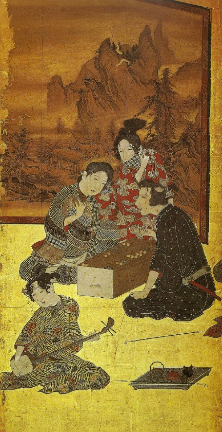 Le Paravent de Hikone (détail) d'une œuvre du XVIIe siècle attribuée périodiquement à Iwasa Matabei (1578-1650). Quoique cette peinture est bien du XVIIe siècle, rien ne justifie son attribution ni son invalidation à Iwasa Matabei. Couleurs sur papier doré (le paravent: 192x94 centimètres). Collection particulière.